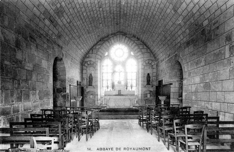 La chapelle du Sacré-Cœeur aménagé provisoirement dans l'ancienne sacristie en 1865, par les Oblats.